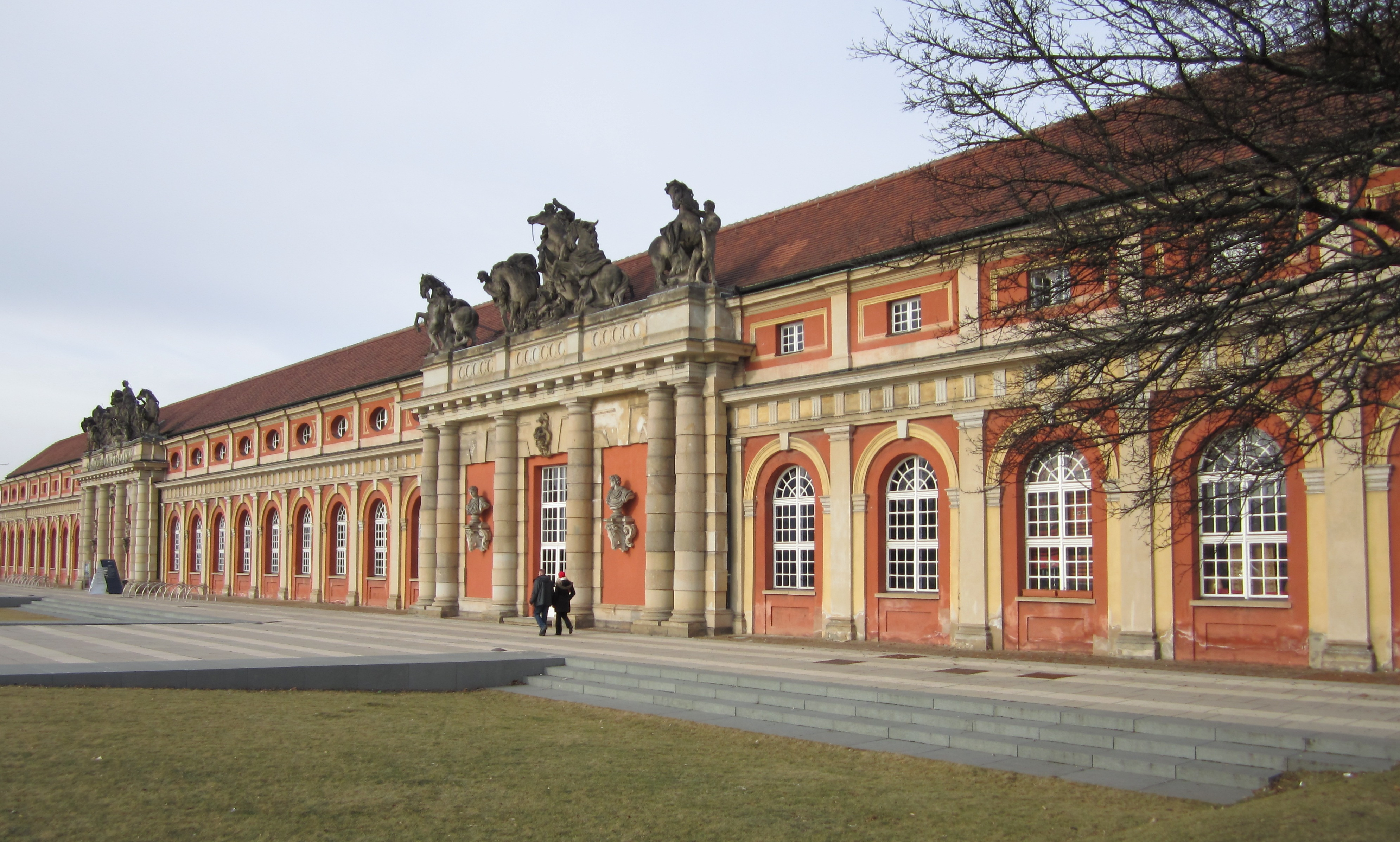 Das Filmmuseum Potsdam, ehemaliger Marstall